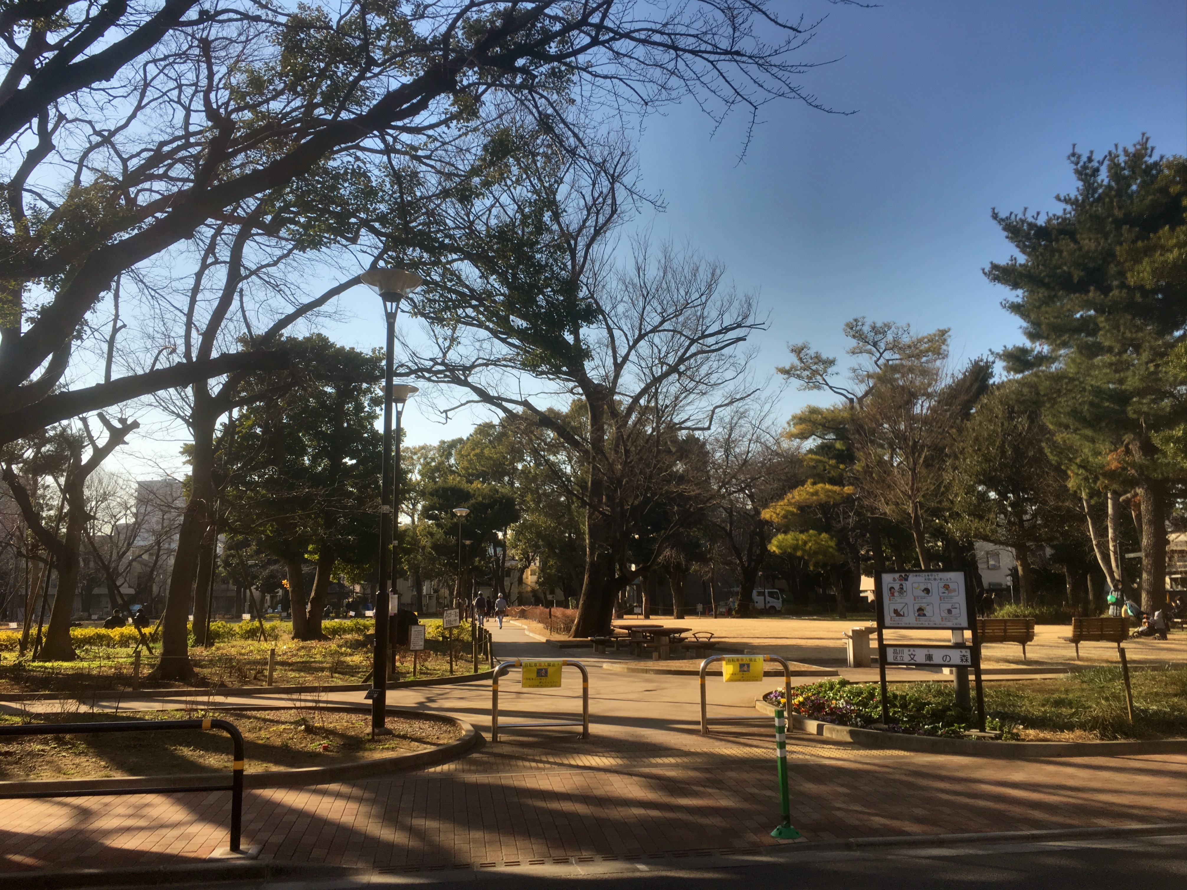 文庫の森 (Bunko no Mori Park)